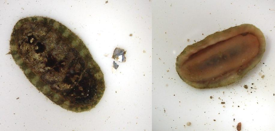 Lepidochitona_cinerea_-_top_and_unserside